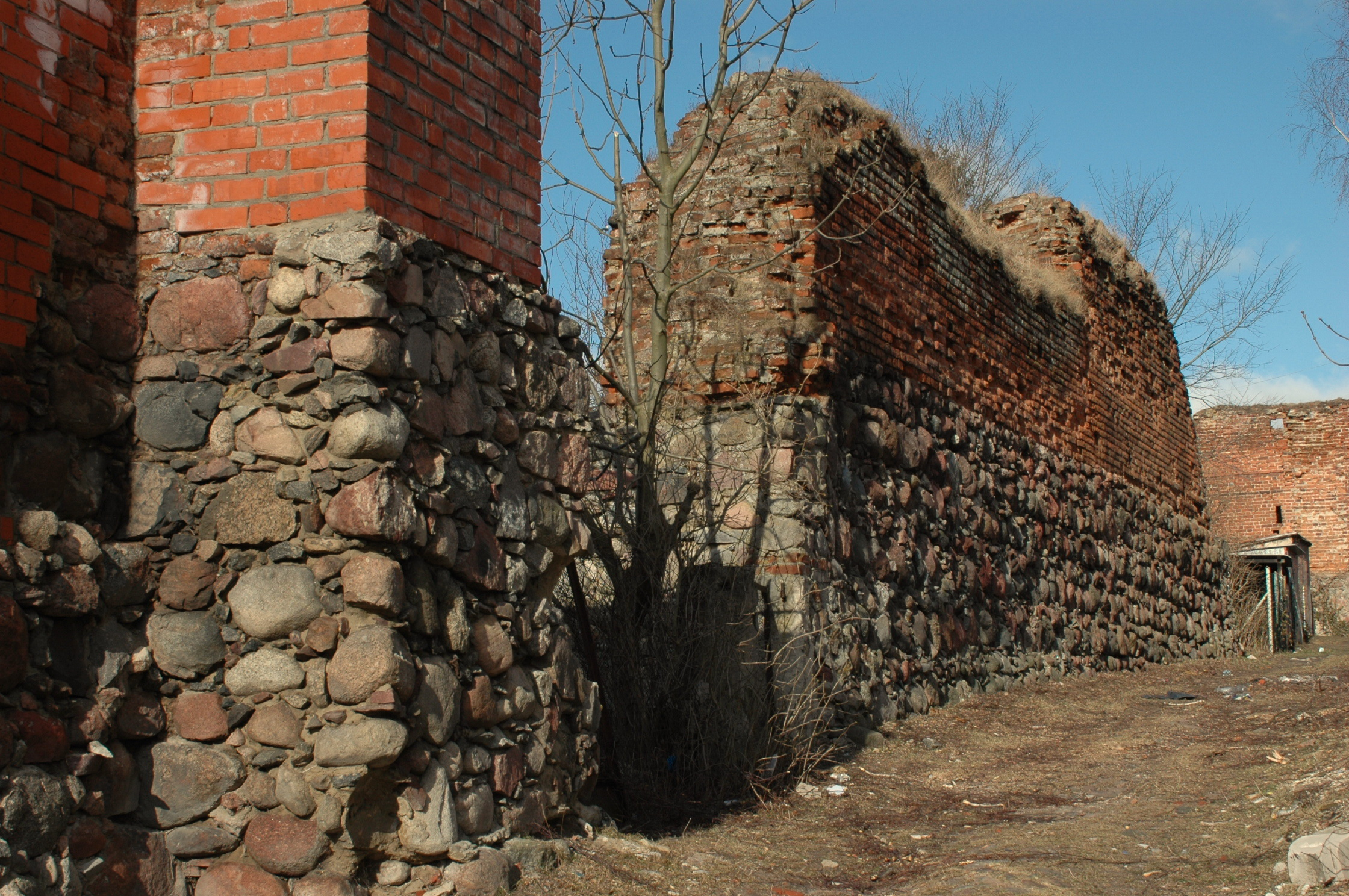 zespół murów miejskich w Debrznie, pow. człuchowski